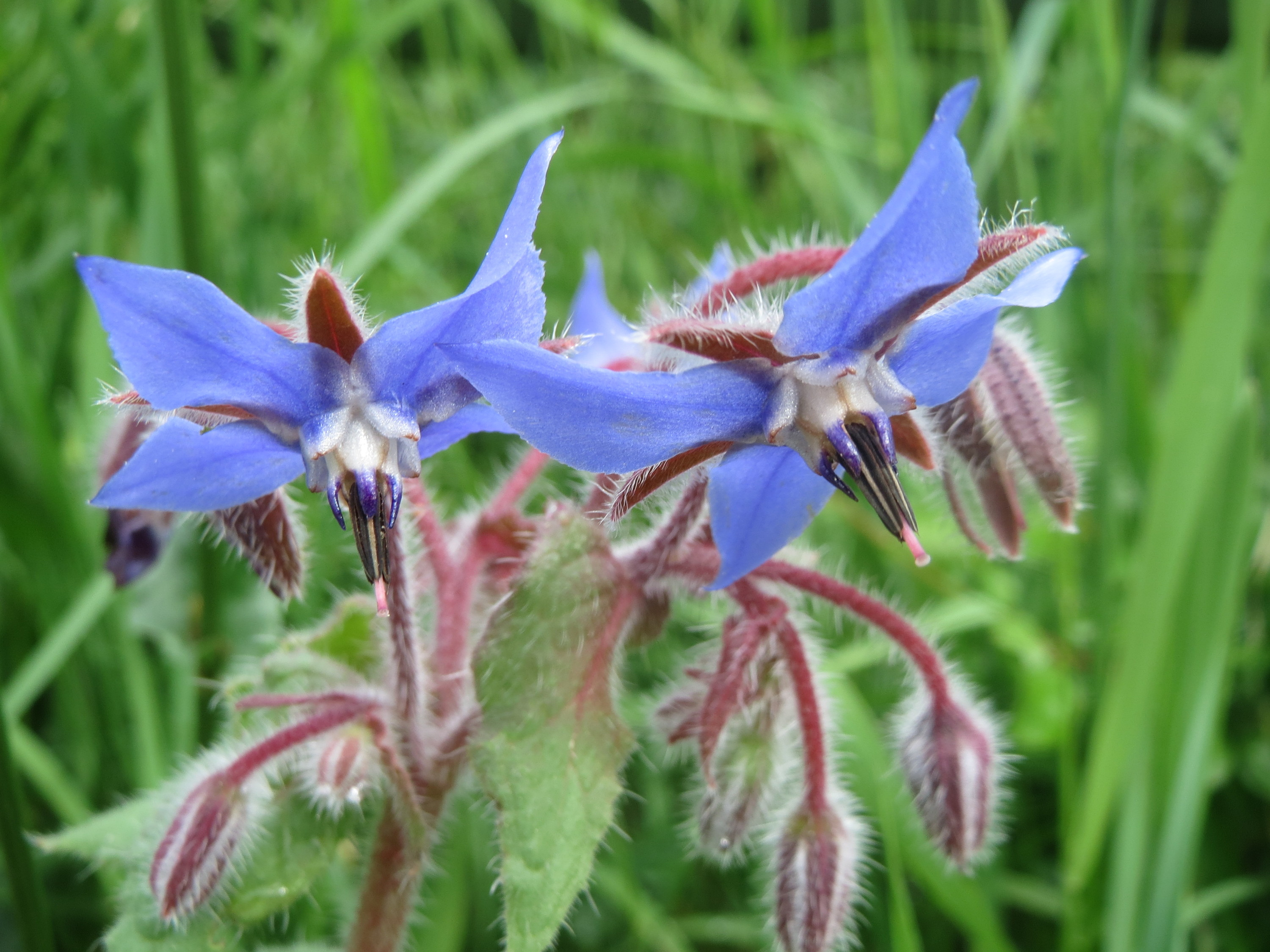 Borretsch (Borago officinalis) im Landschaftsschutzgebiet „Rheinhessisches Rheingebiet“ bei Worms